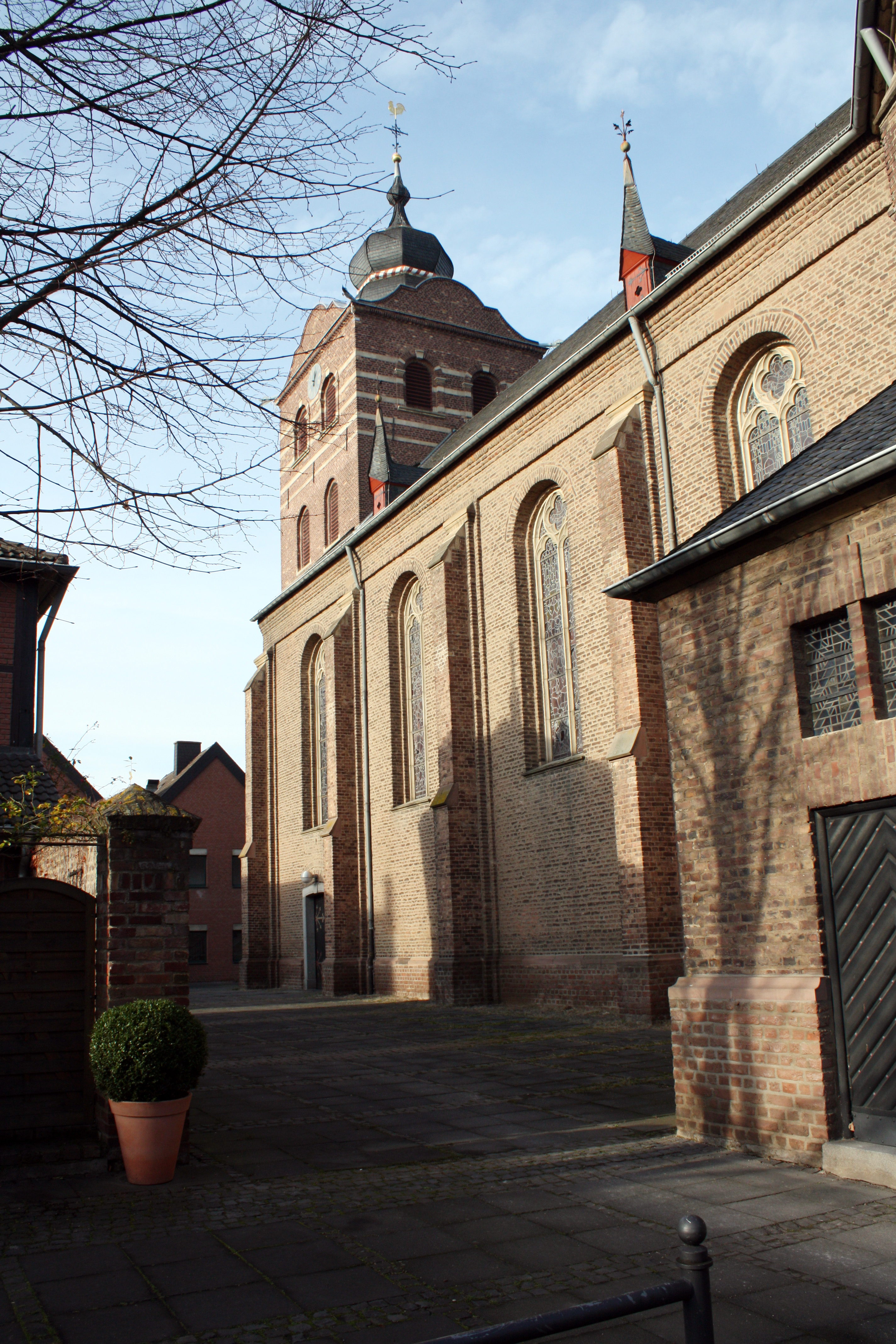 Erftstadt-Lechenich, St. Kilian